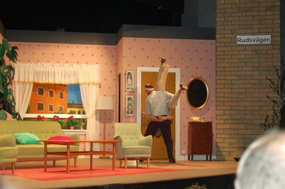 Teateruppsättningen av Kuta och Kör i Mariebergsskogen 2009. Karlstad, Sweden